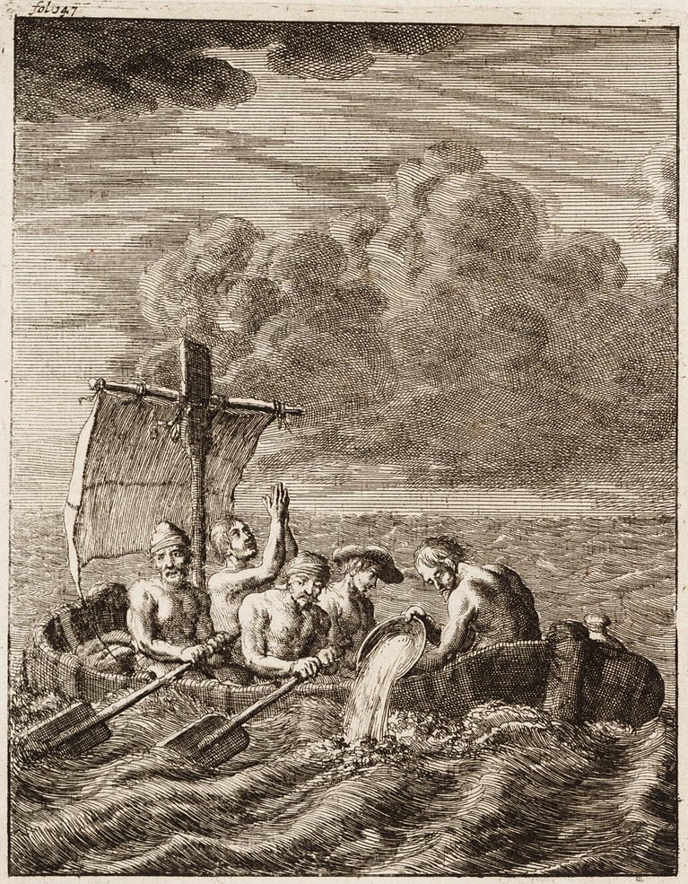 Gravure hollandaise ancienne. "Vlucht van 5 Engelse slaven uit Algiers in een kleine roeiboot". Evasion de 5 esclaves anglais d'Alger à bord d'une petite trainière.